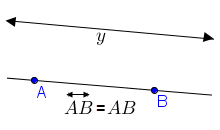 Права - означување